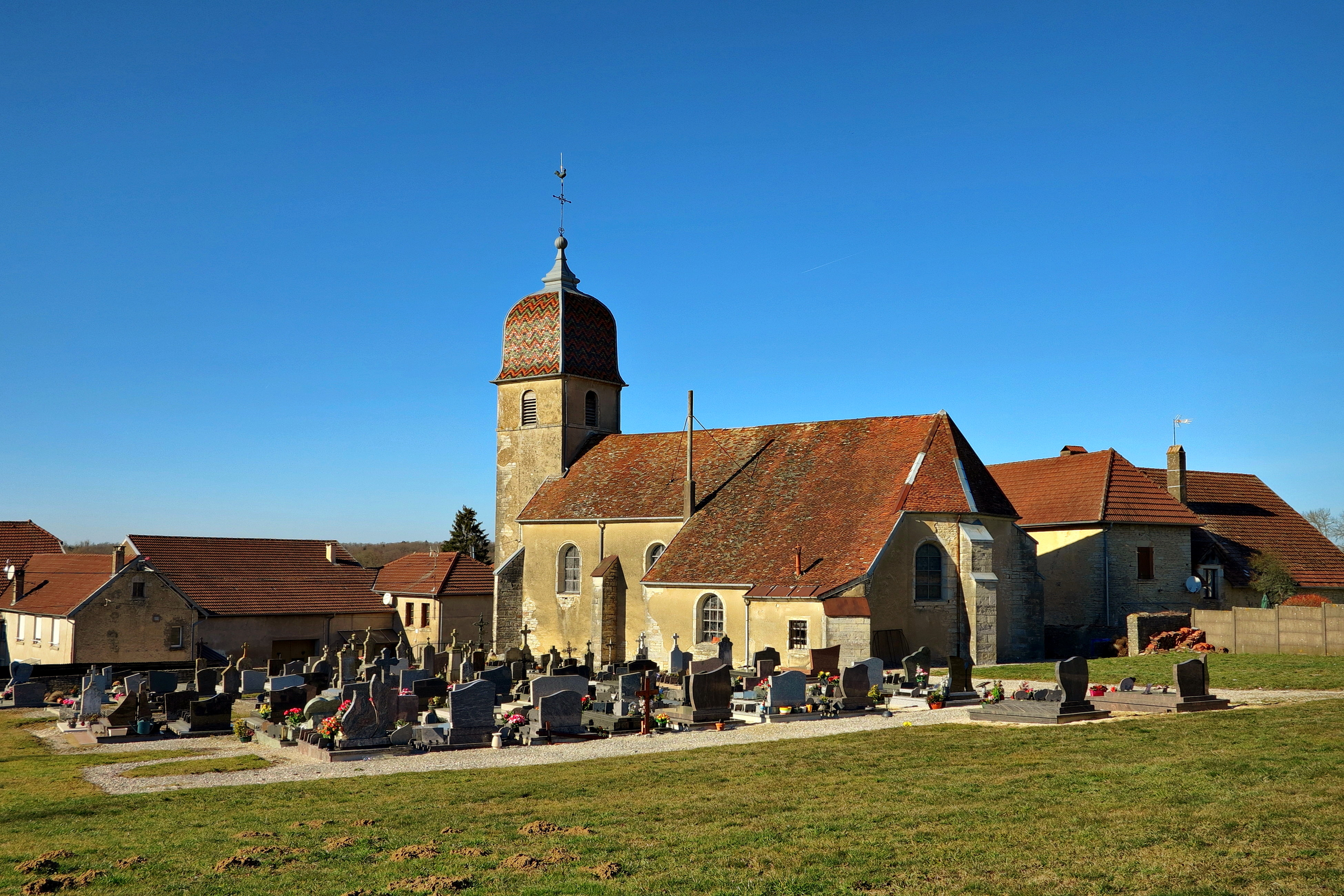 L'église de Bourguignon-lès-La-Charité